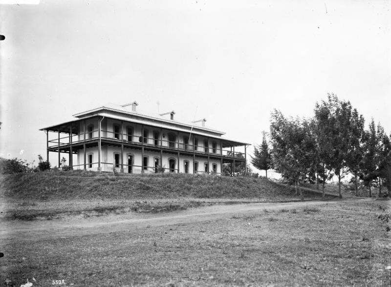 Mission Kilema am Kilimandscharo